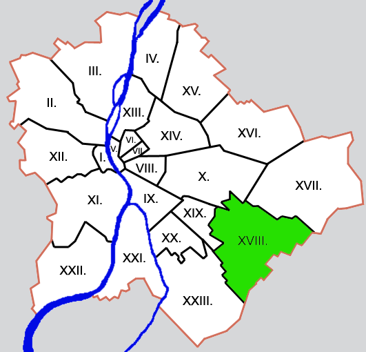 Budapest kerületei: XVIII. kerület